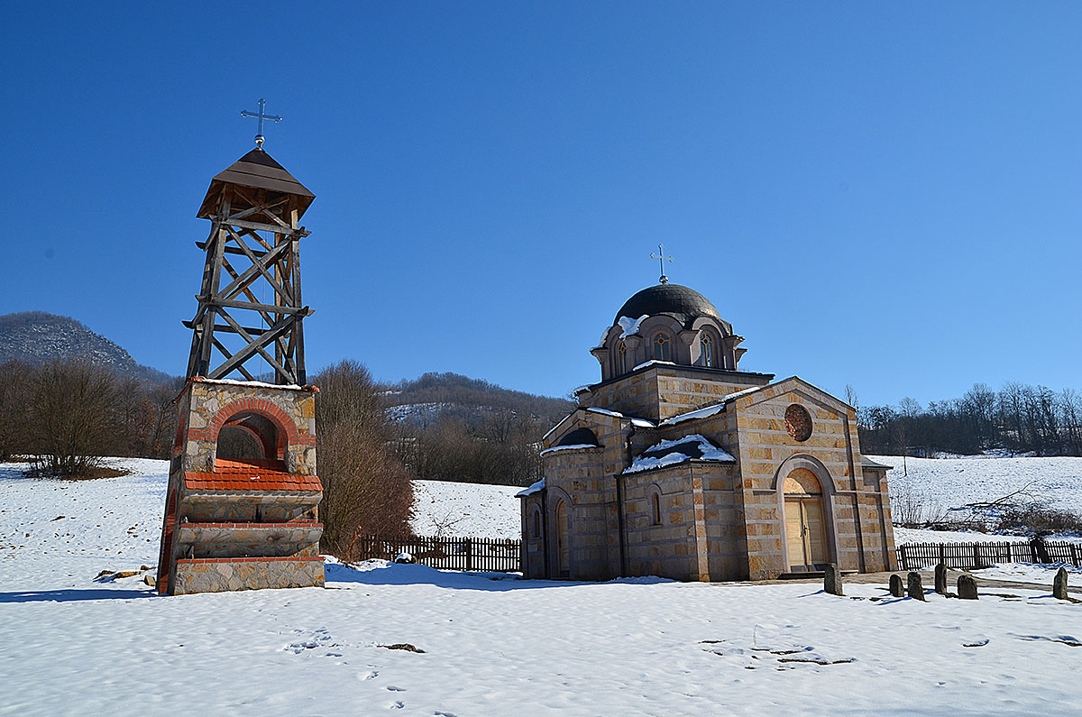 Црква у Светињи, село Јабланица. У позадини се види врх Треска.